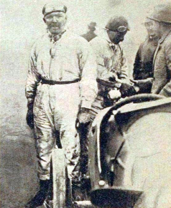 Albert Divo, vainqueur du Grand Prix d'Espagne 1923 sur Sunbeam.